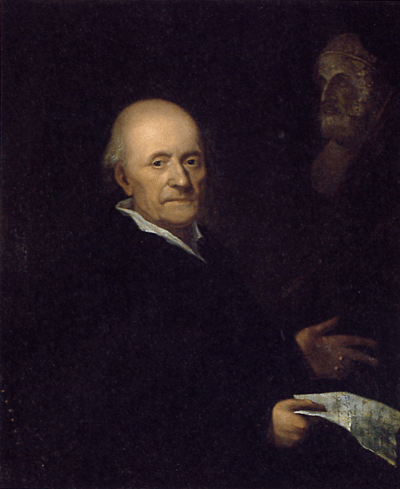 „Friedrich Gottlieb Klopstock“, Portrait, Ölgemälde (?) 1792, Kniestück nach rechts: Klopstock in dunklem Sessel vor neutralem Hintergrund sitzend, in schwarzem Hausrock und weißem, offenem Hemd, weißes, kurzes Haar nur noch an den Schläfen, die linke Hand skandierend, in der rechten Hand ein Manuskript mit der zwölften Strophe seiner 1748 entstandenen Ode "Der Abschied". Hinter einem Vorhang, im Schatten, die Büste Homers. Anlässlich des Todes von Klopstock 1803 von der Patriotischen Gesellschaft ausgestellt, ehemals in deren Besitz, heute Museum für Hamburgische Geschichte, Inv. 1950/19; vgl. Gisela Jaacks, Gesichter und Persönlichkeiten, Bestandskatalog der Porträtsammlung im Museum für Hamburgische Geschichte I., Hamburg 1992, S. 205 books.google. Bei Hans Schröder: Lexikon der hamburgischen Schriftsteller bis zur Gegenwart, Bd. 4, Hamburg 1866, Nr. 1964, Klopstock, Friedrich Gottlieb, Fußnote: Folgende Originalgemälde ...: "1793 angelegt, aber erst 1803 vollendet. Vergl. Verzeichnis der sechsten Ausstellung der Patriotischen Gesellschaft Mai 1803 Seite 12, Nr. 40, und Verhandlungen ders. Ges. Band 7 Seite 35."